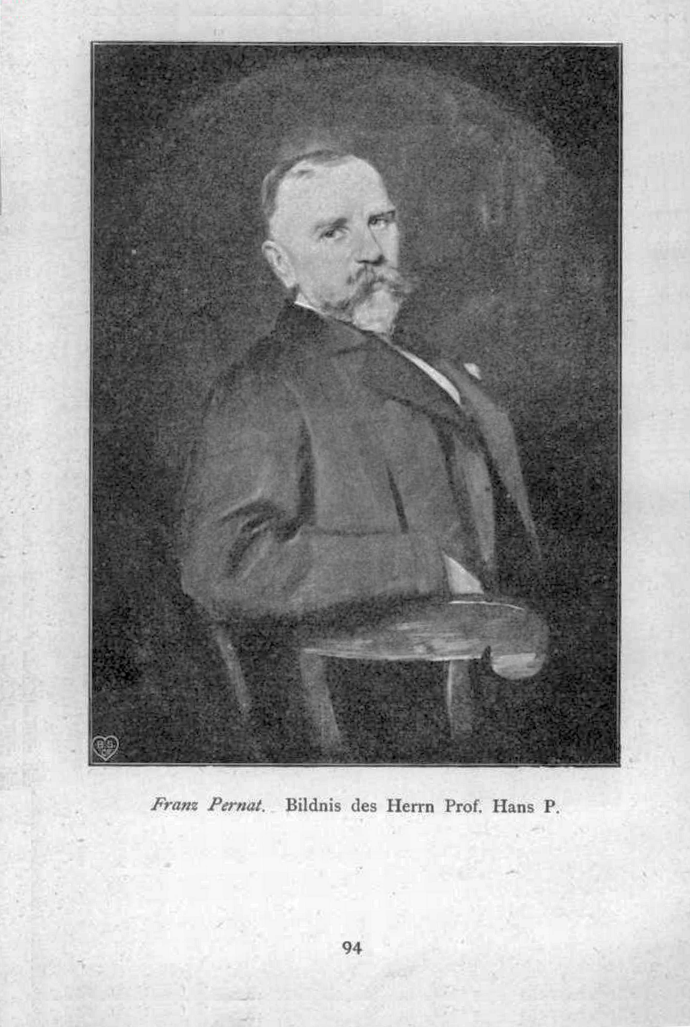 Bildnis des Herrn Prof. Hans P.